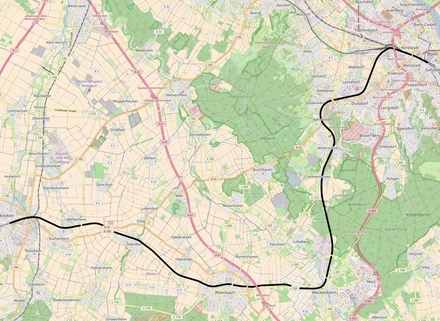 DB 2645, Bonn - Euskirchen